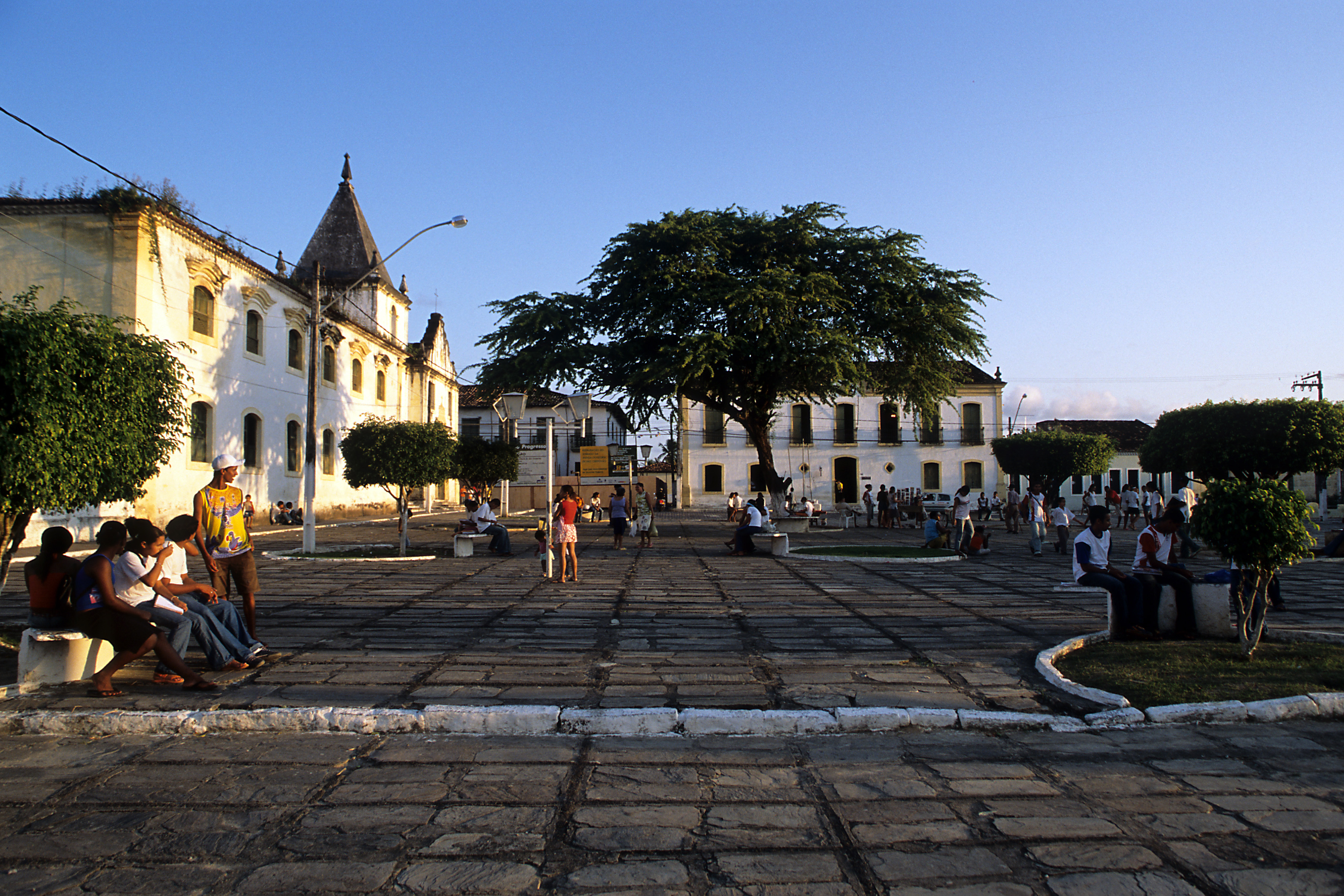 Crédito: Anderson Schneider/IPHAN